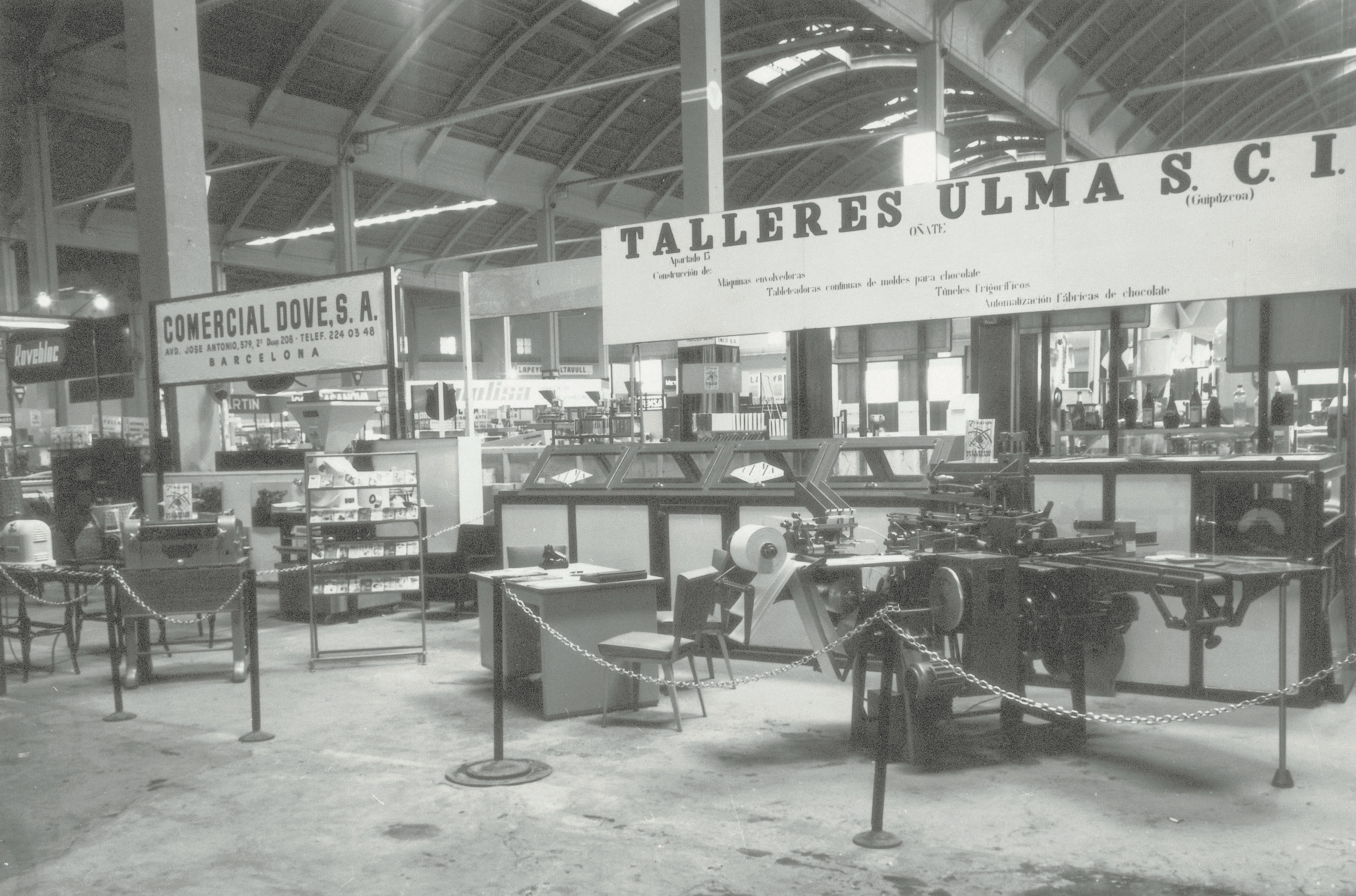 Presenta de ULMA en la XXXI Feria Oficial e Internacional de Muestras de Barcelona de 1963